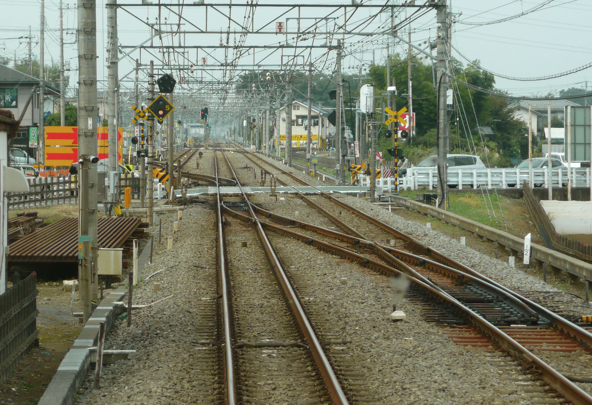 南入曽信号所